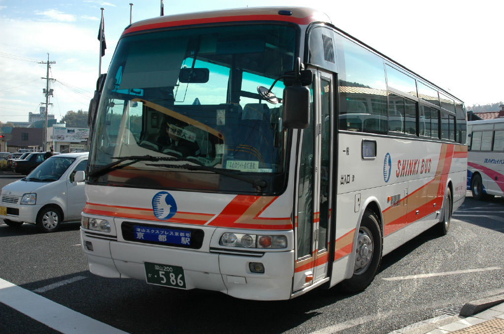 津山駅前にて、2006-11-26撮影